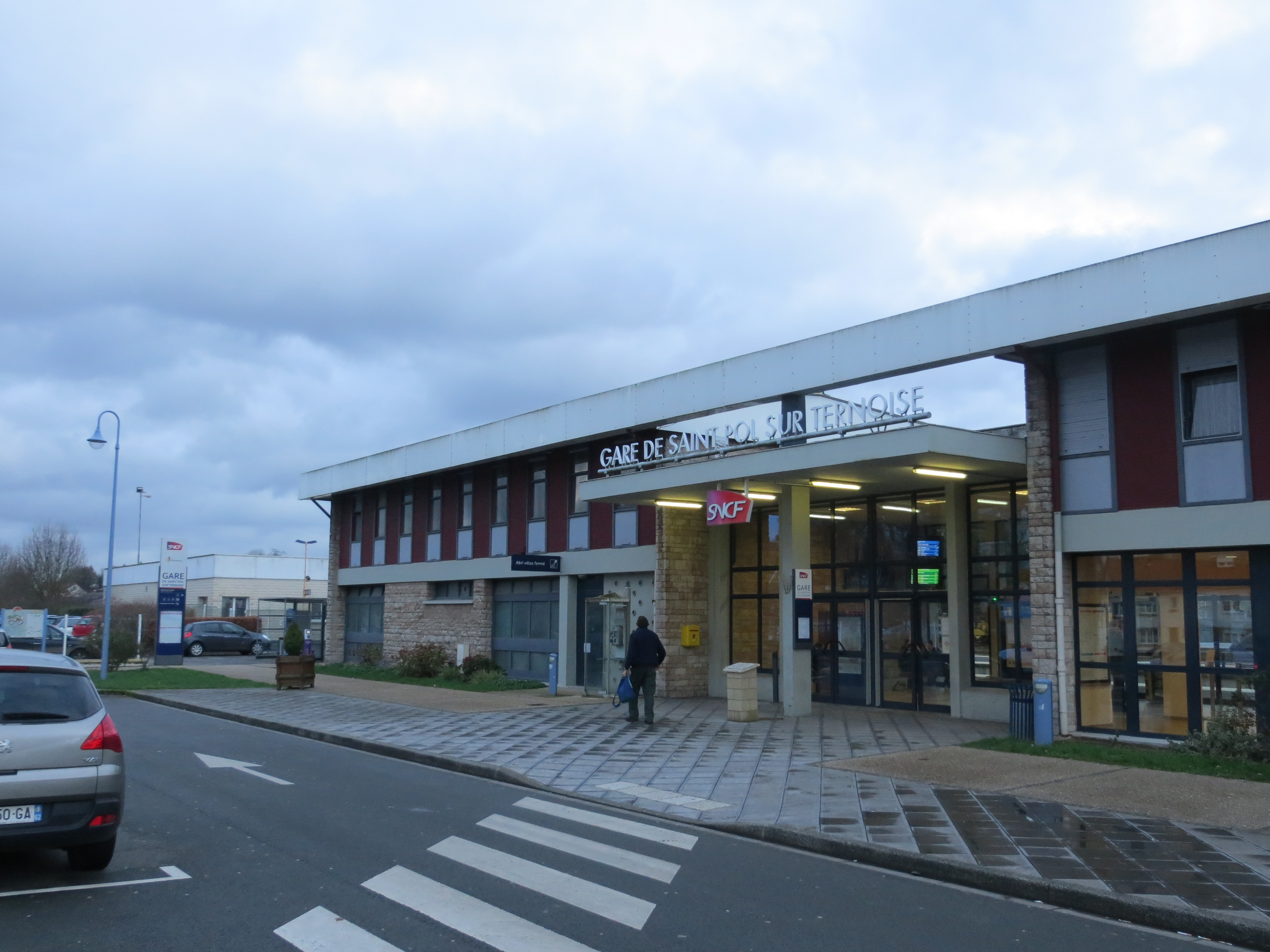 façade de la gare de Saint-Pol-sur-Ternoise